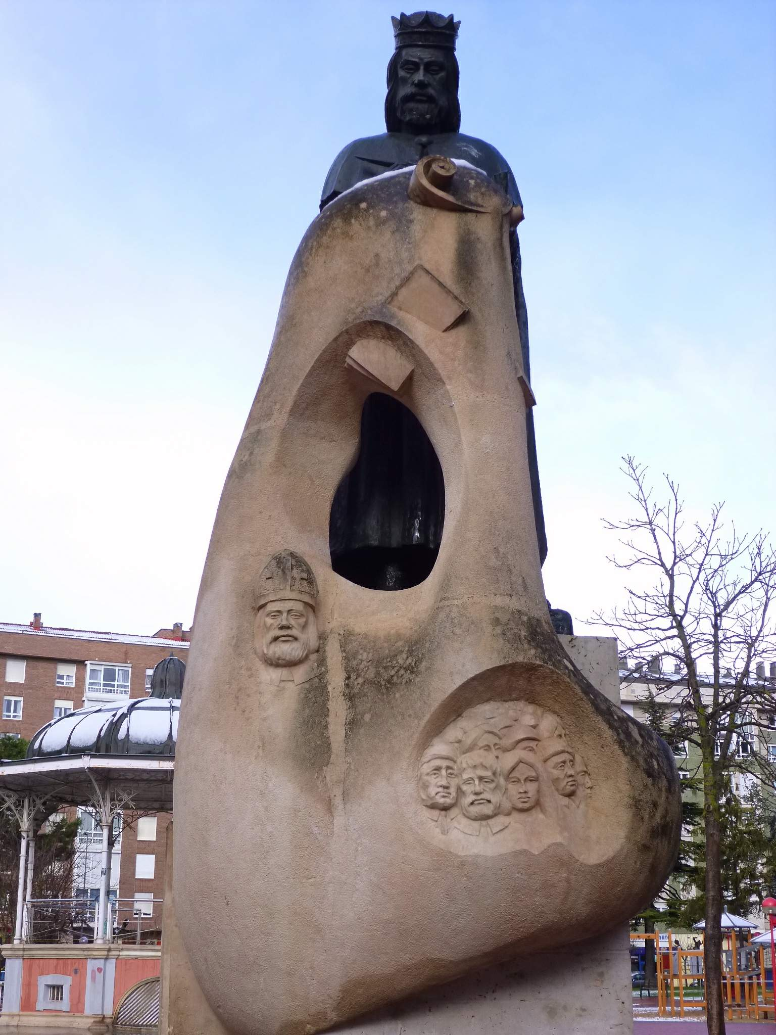 Parque Antonio Machado (Miranda de Ebro, Burgos)